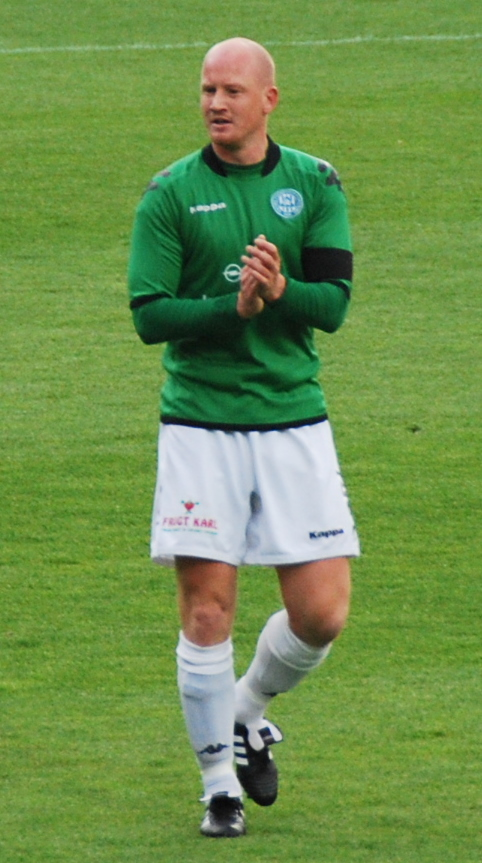 Fodboldspilleren Nicolai Melchiorsen fra Viborg FF. Her i 1. divisionskampen mod Kolding FC på Viborg Stadion.